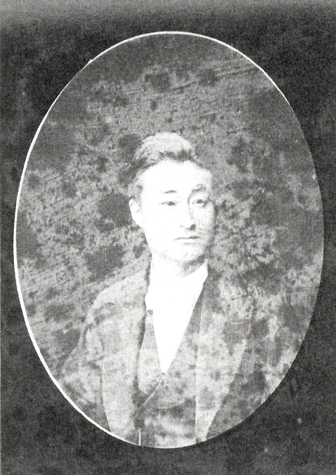 前田利昭の肖像写真。